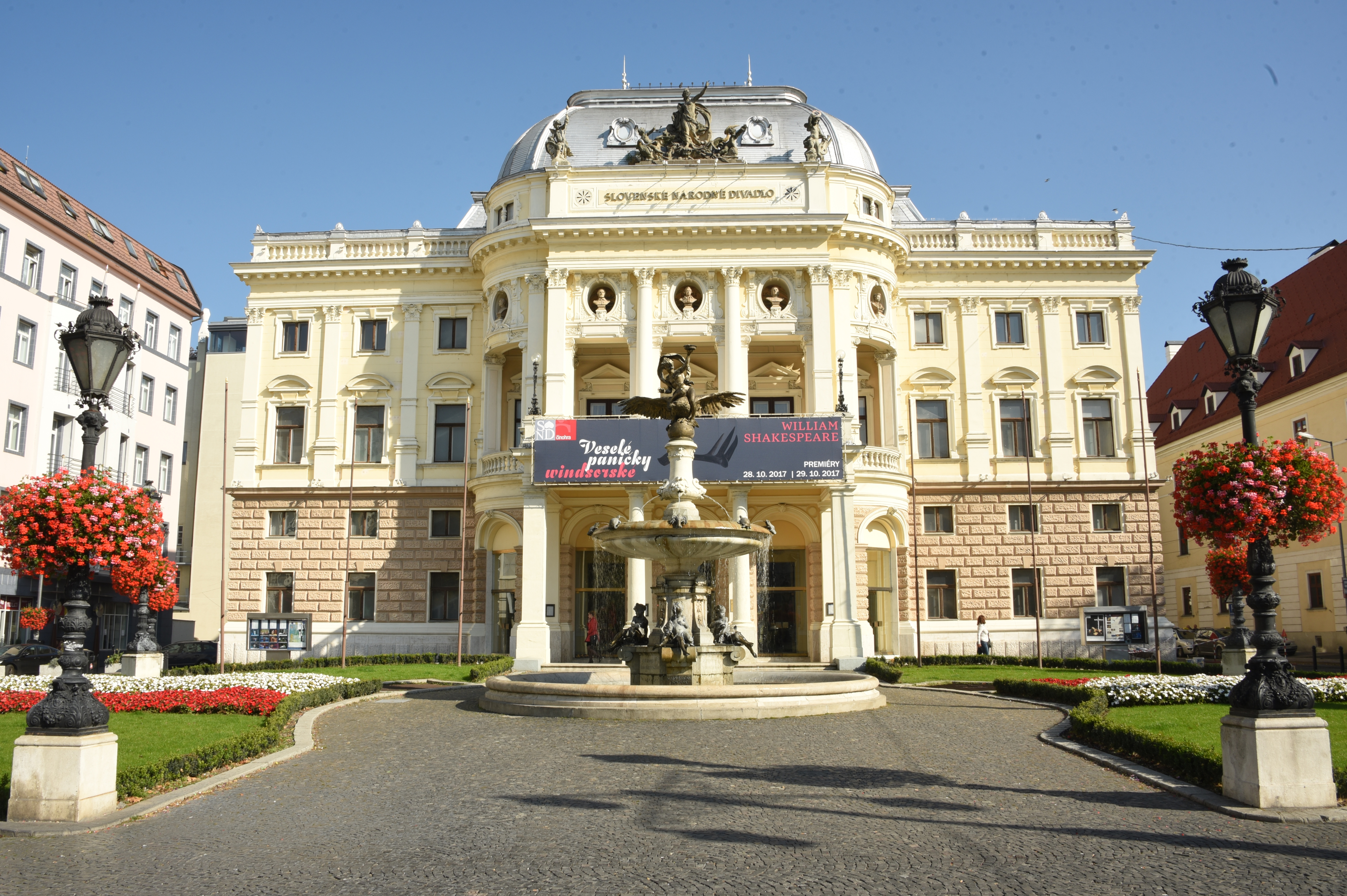 Slowakisches Nationaltheater